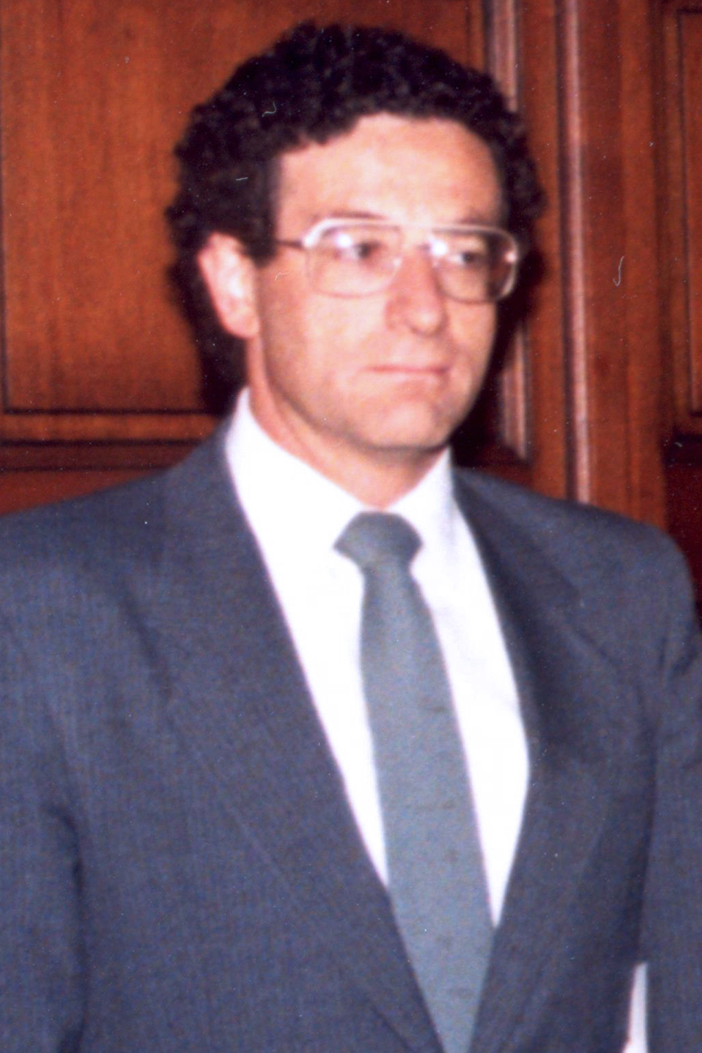 El primer Consejo del Banco Central autónomo en 1990. Roberto Zahler, Enrique Seguel, Alejandro Foxley (Ministro de Hacienda), Andrés Bianchi (presidente), Juan Eduardo Herrera y Alfonso Serrano.